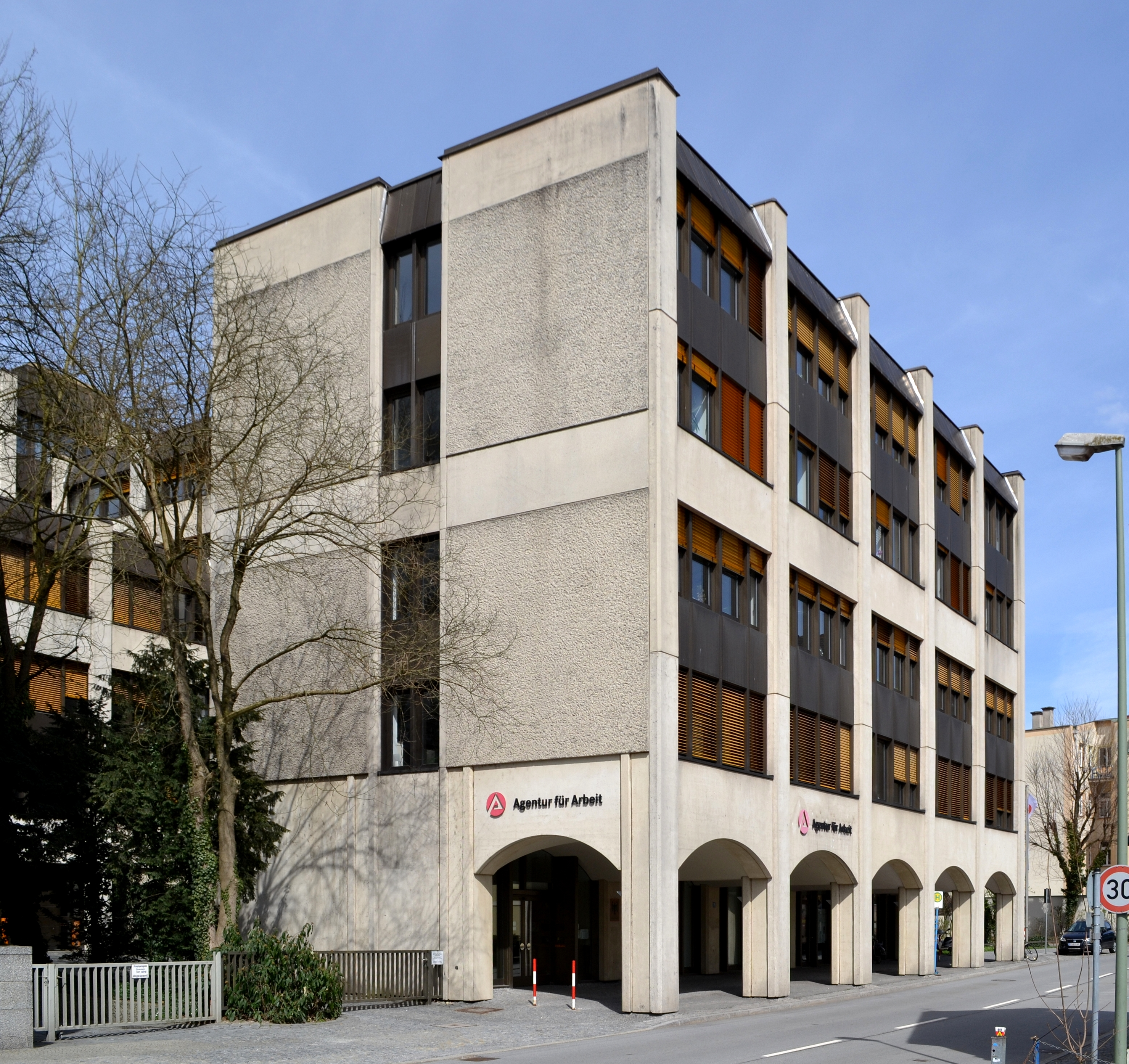 Die Agentur für Arbeit in Passau.